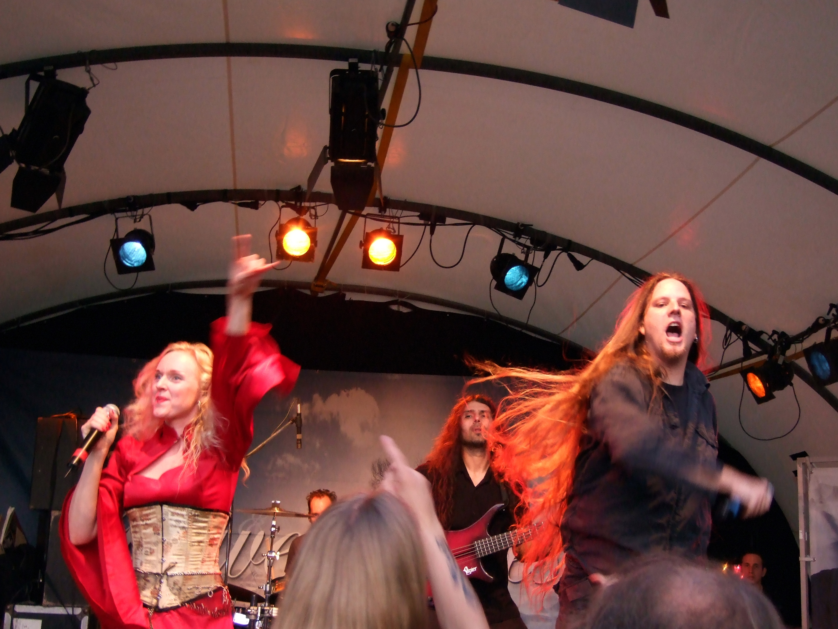 Leaves' Eyes, Liv Kristine & Alexander Krull, Henkersfest Stuttgart, July 2007